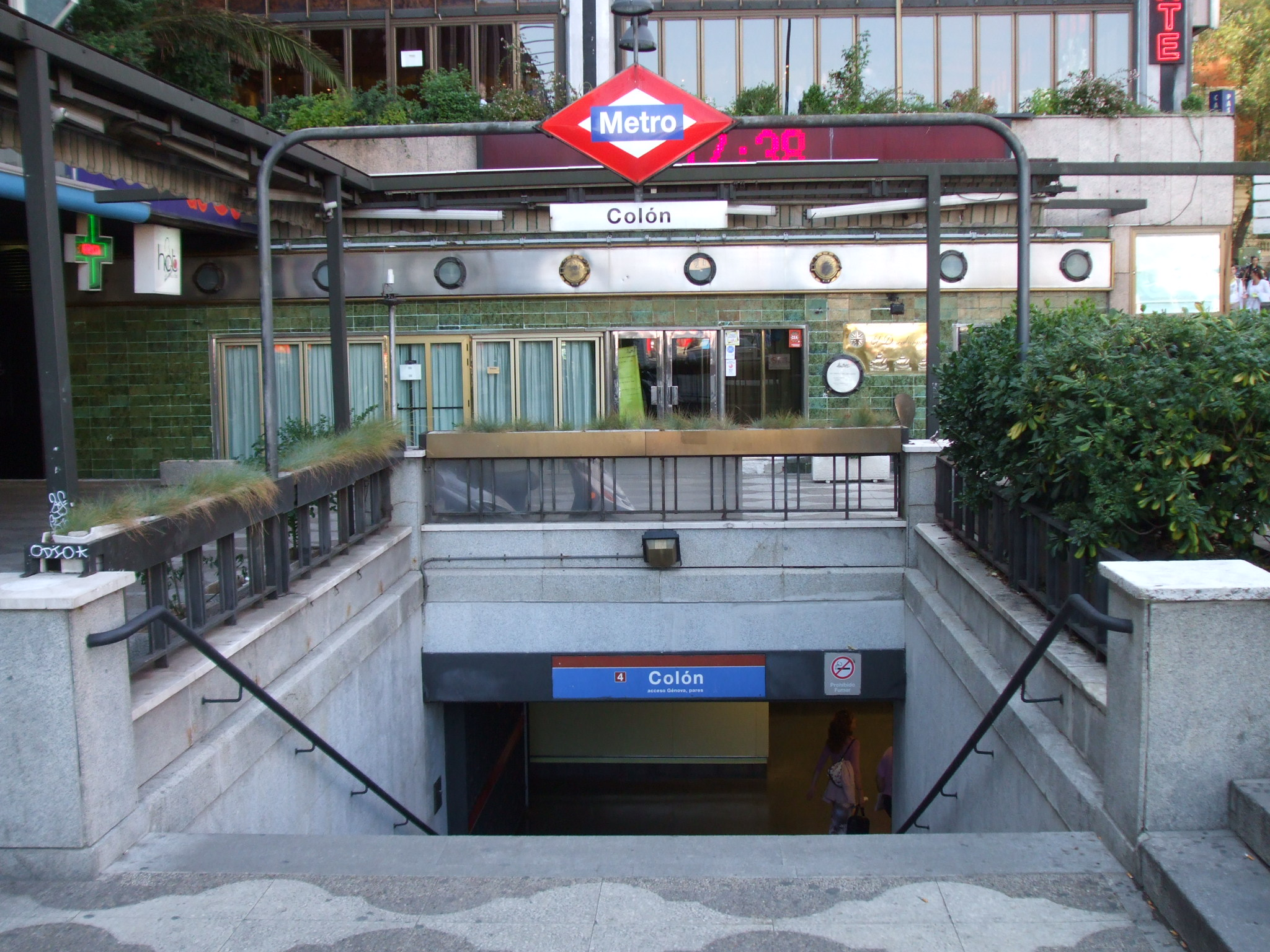 Acceso a la Estación de Colón del Metro, junto al Museo de Cera